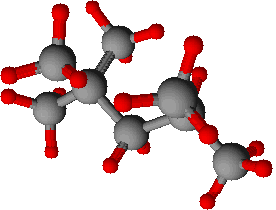 Model izooktanu